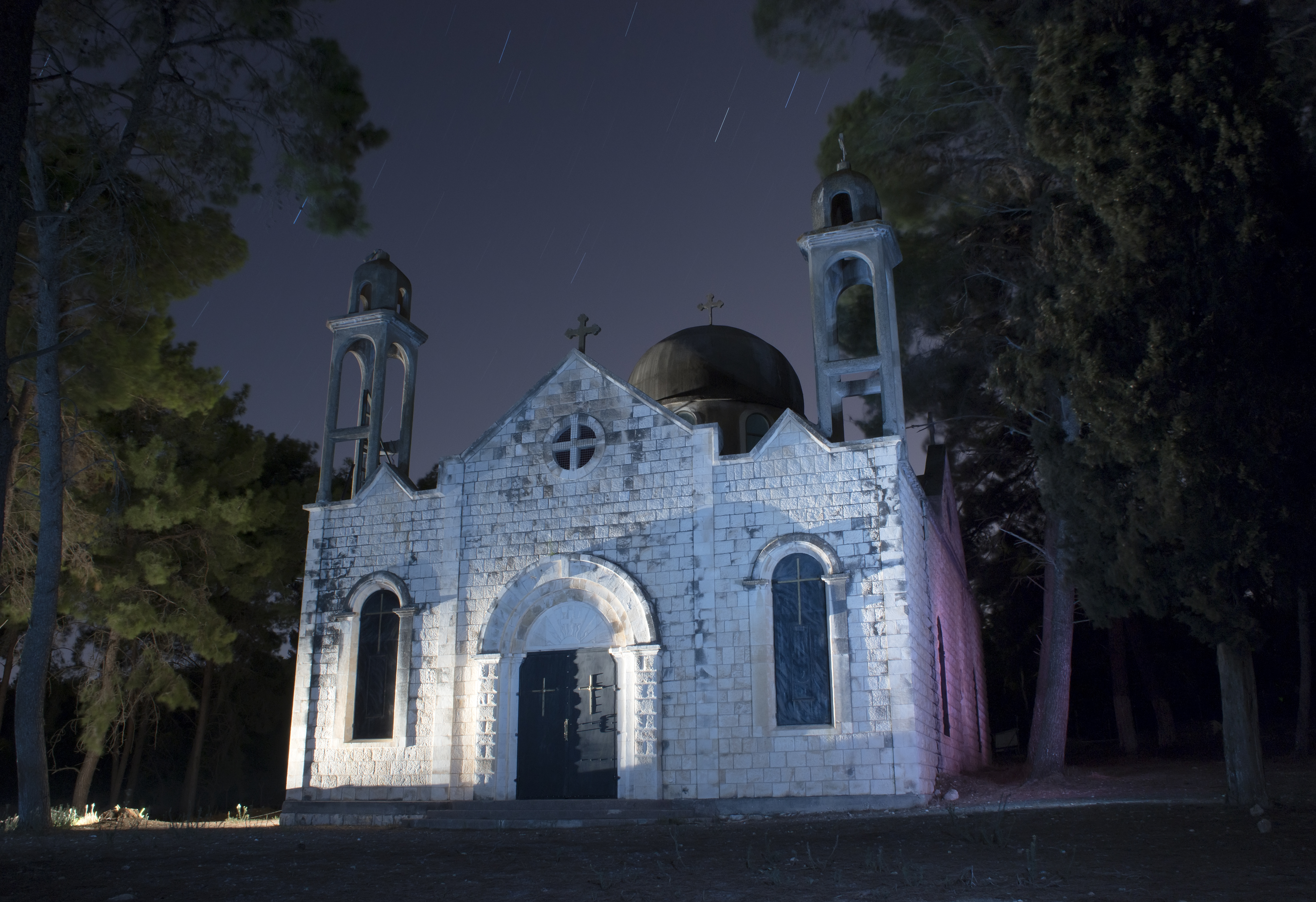 מעלוּל היה כפר ערבי שהתקיים בשוליו הצפוניים של עמק יזרעאל, על שלוחה מערבית של הרי נצרת, כ-6 ק"מ דרומית-מערבית לעיר נצרת. הכפר היה מאוכלס ברובו באוכלוסייה נוצרית. במהלך מלחמת העצמאות, במסגרת מבצע דקל נגד צבא ההצלה, נכבש הכפר ב-15 ביולי 1948 על ידי כוח מחטיבת גולני. בתי הכפר נהרסו. לאחר הריסתו עברו רבים מתושביו לנצרת וליפיע הסמוכות. כיום נותרו באתר שתי כנסיות שאחת מהן שופצה בשנת 2010 ומופעלת על ידי צאצאי בני הכפר.